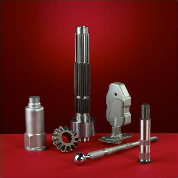 Pièces forgés de précision pour l'automibile